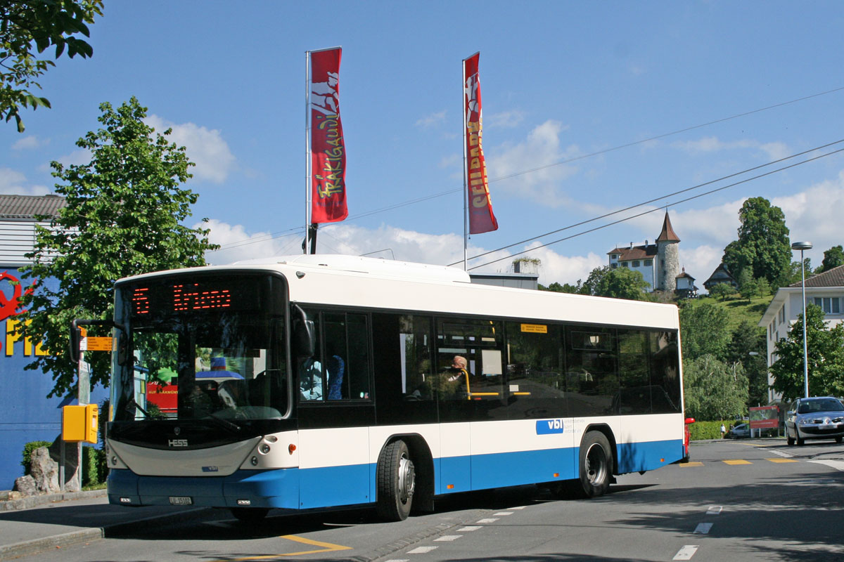 Der Scania/Hess N280UB Nr. 575 der vbl (Bj. 2009) unterwegs auf der Krienserquartierbuslinie 15 bei der Station Pilatusbahnen. Diese Buslinie wird von der Firma Heggli im Auftrag der vbl betrieben.